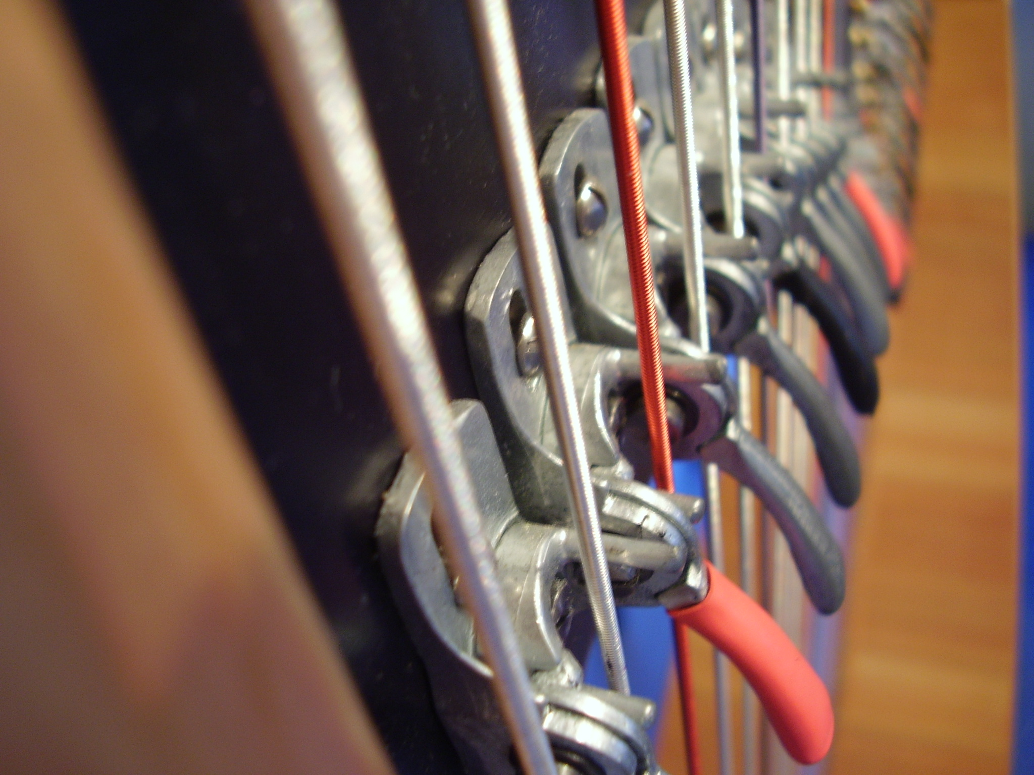 Harp String